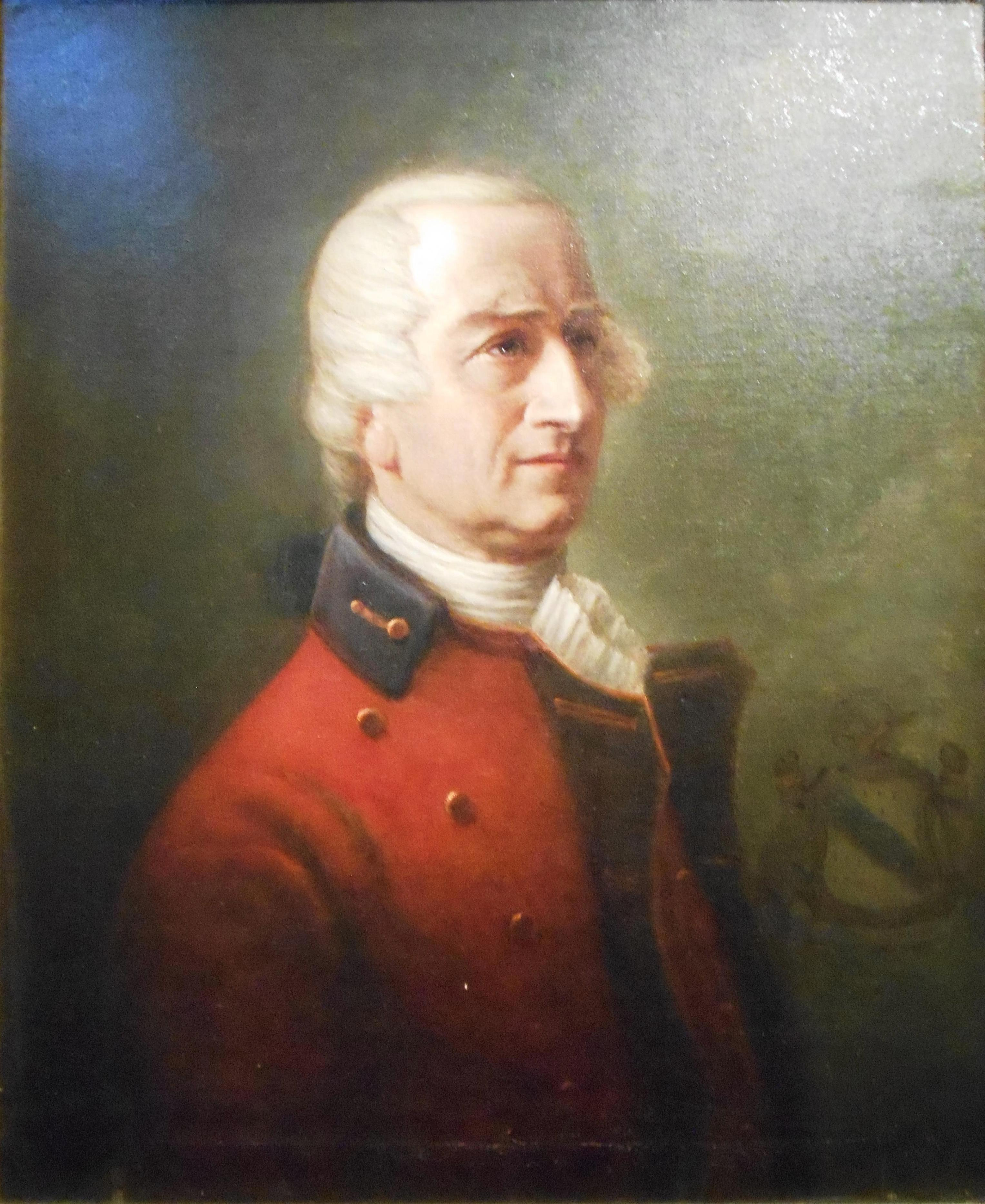 Sir Guy Carleton, premier baron Dorchester (1724-1808), huile sur toile